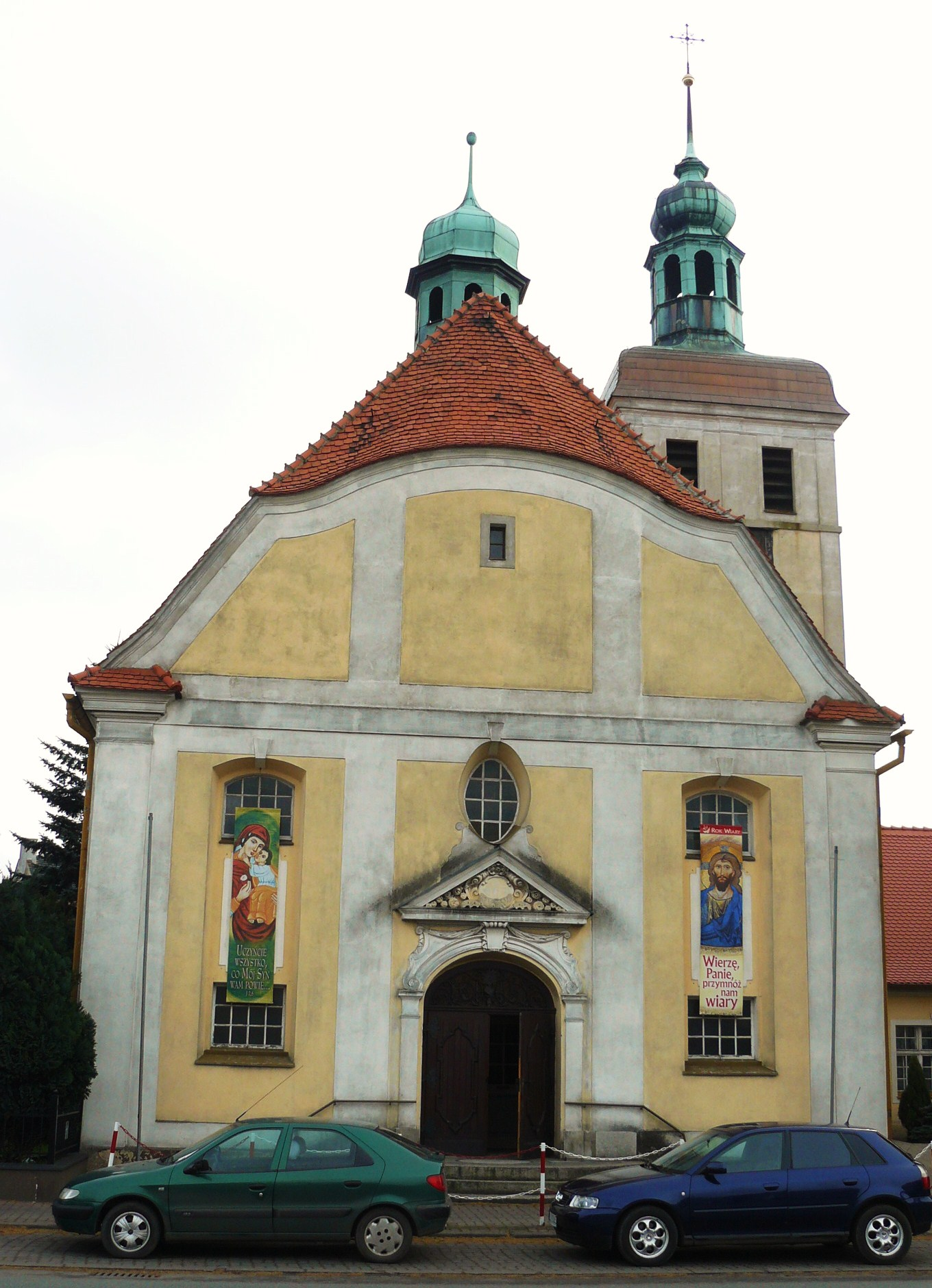 Nowe Skalmierzyce - dawny kościół ewangelicki, obecnie rzymskokatolicki pw. MB Nieustającej Pomocy, 1911.